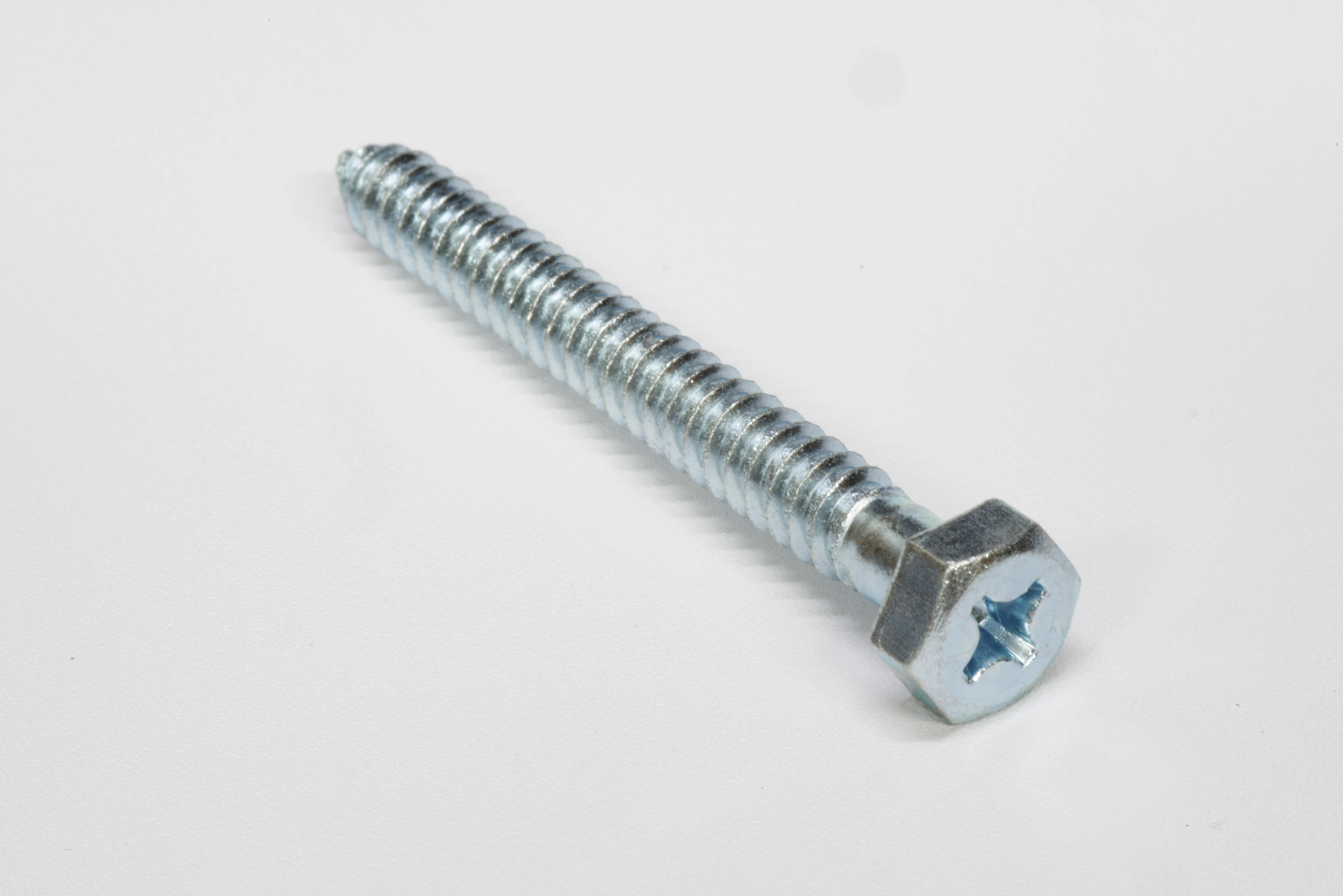 Holzschraube mit kombiniertem Sechskantkopf und PH2.